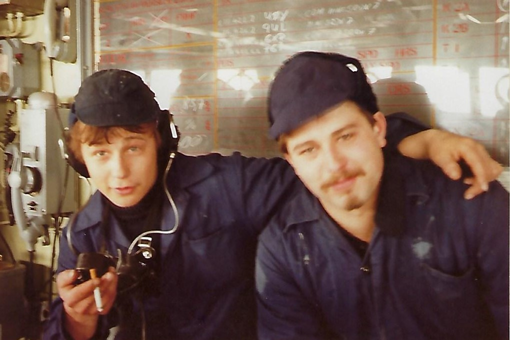 Zwei Mannschaftsdienstgrade im Brückendienst auf dem Zerstörer Mölders